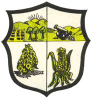 Escudo de San Pedro, Valle del Cauca